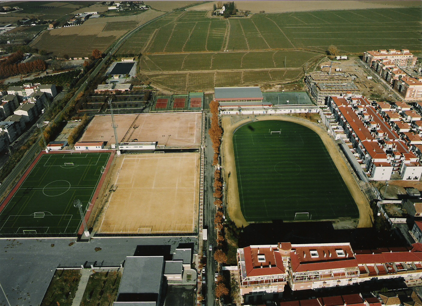 Imagen Aérea de la Ciudad Deportiva de Maracena, en la provincia de Granada (España)